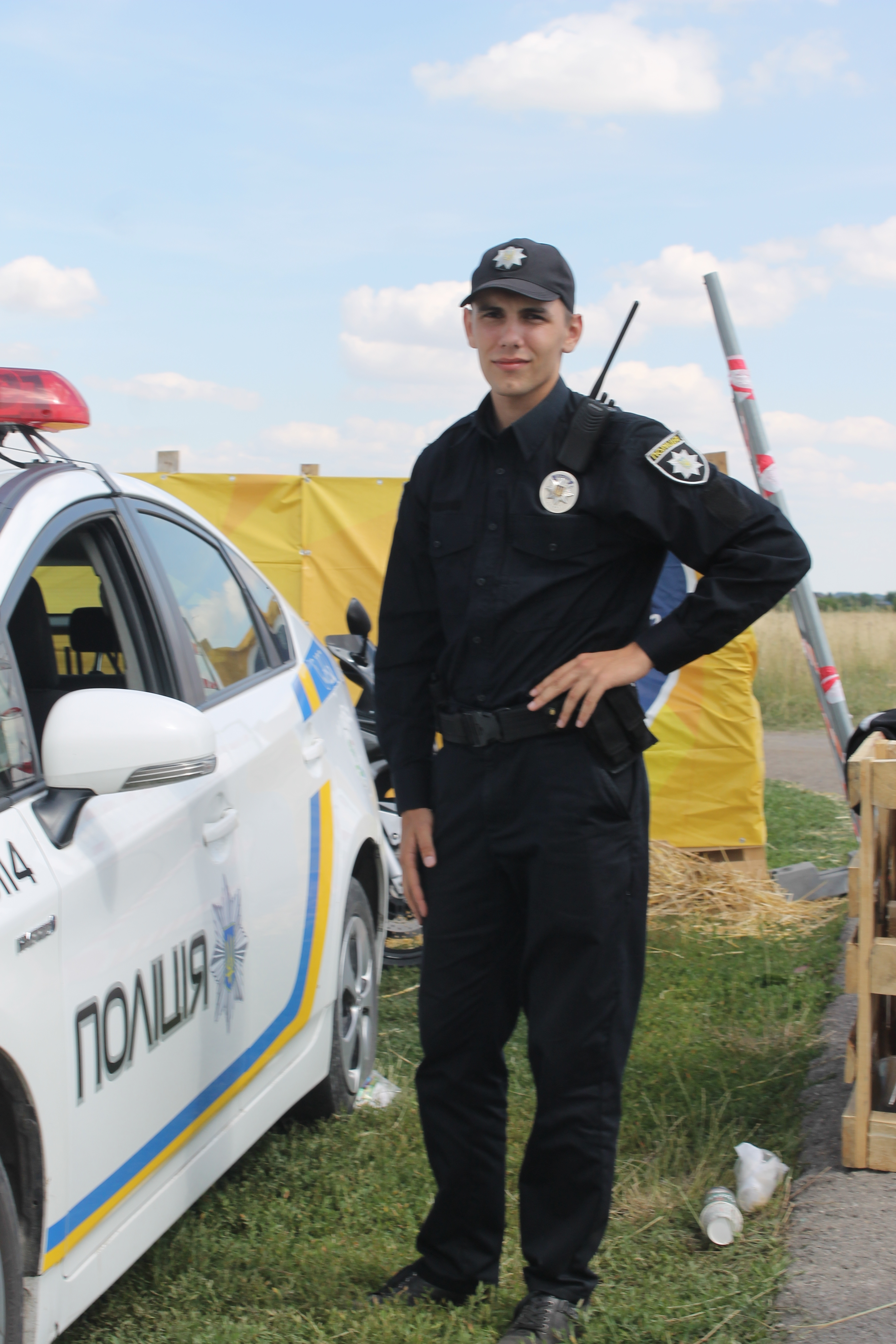 Офіцер патрульної поліції на фестивалі